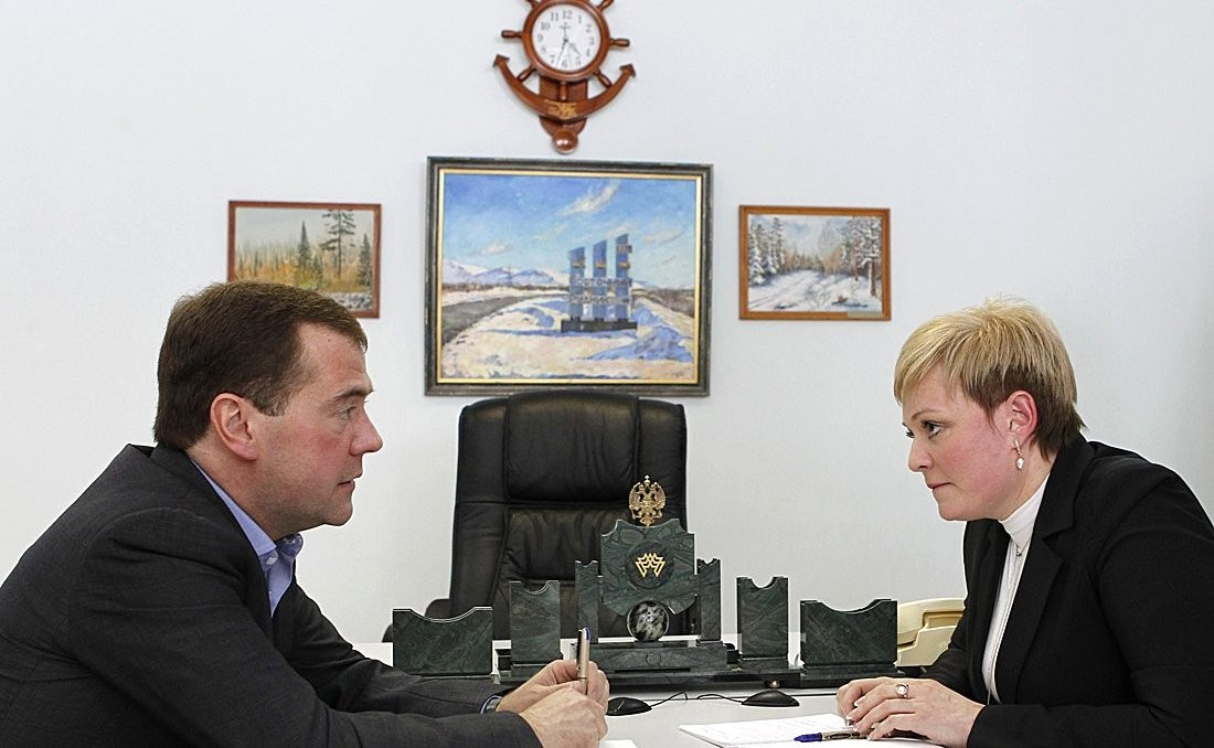 С временно исполняющей обязанности губернатора Мурманской области Мариной Ковтун.